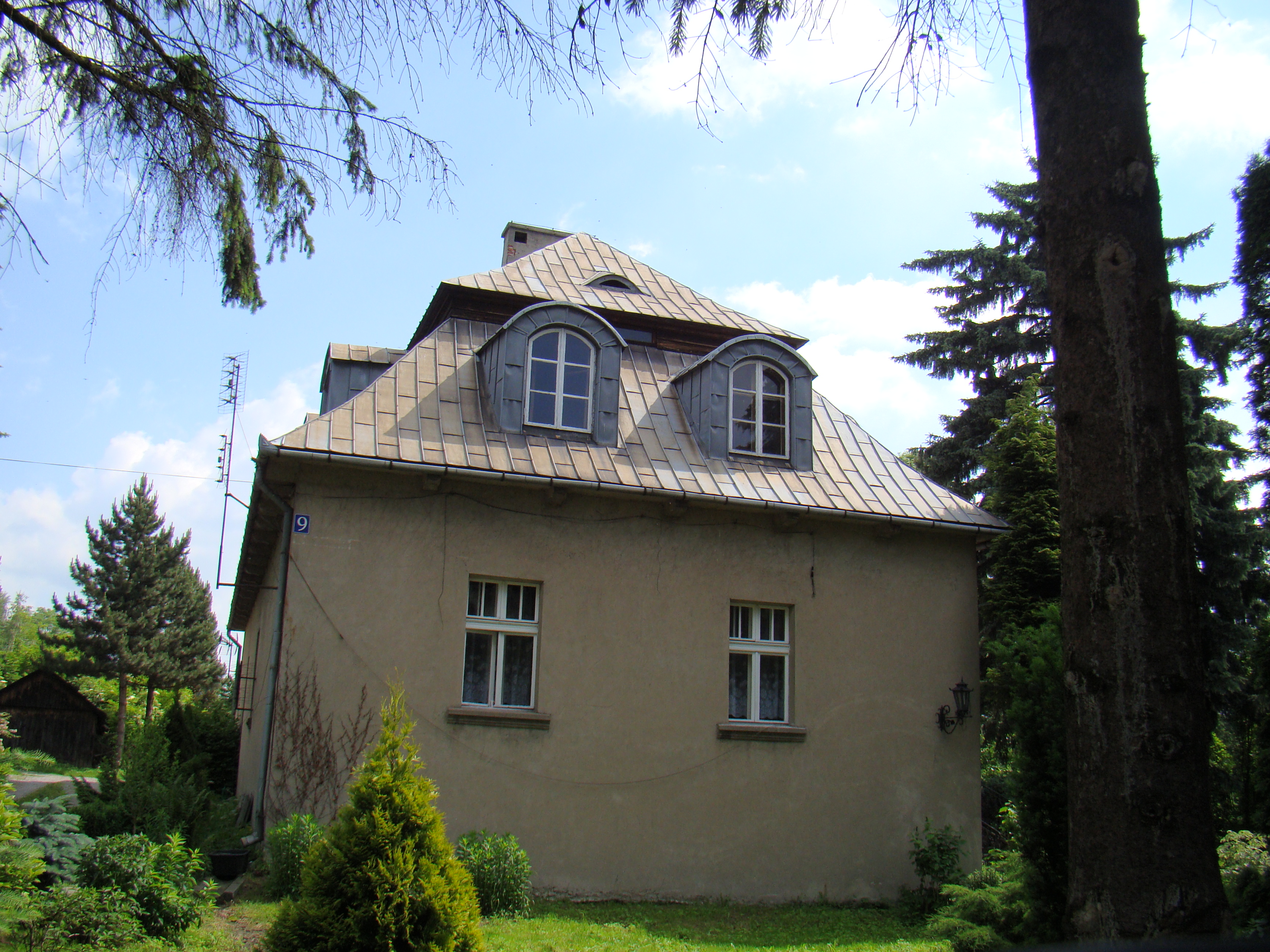 Sławków, dom "Lamus", dawny dwór biskupów krakowskich, XVI, XVIII w.